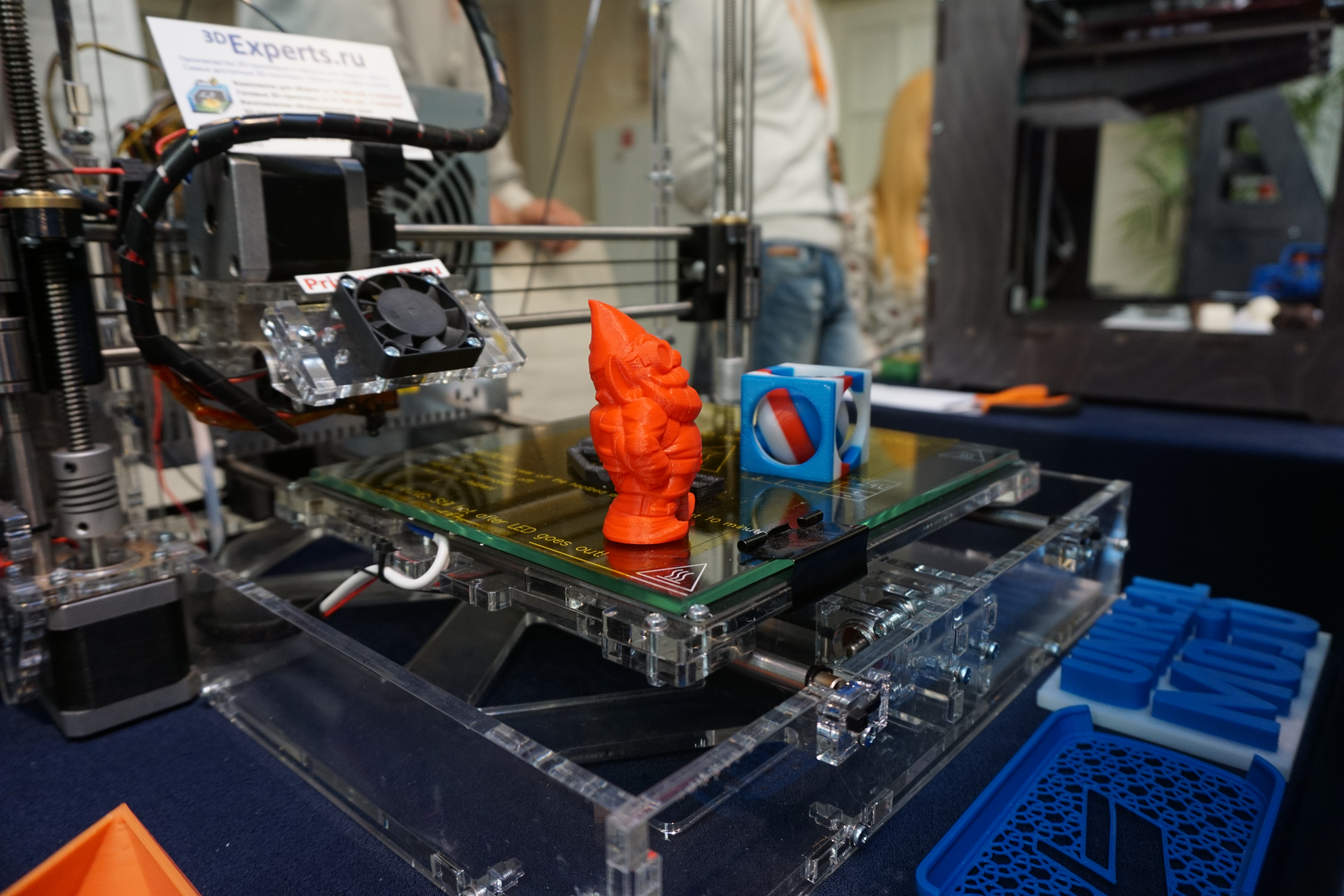 3D принтер в Университетe ИТМО